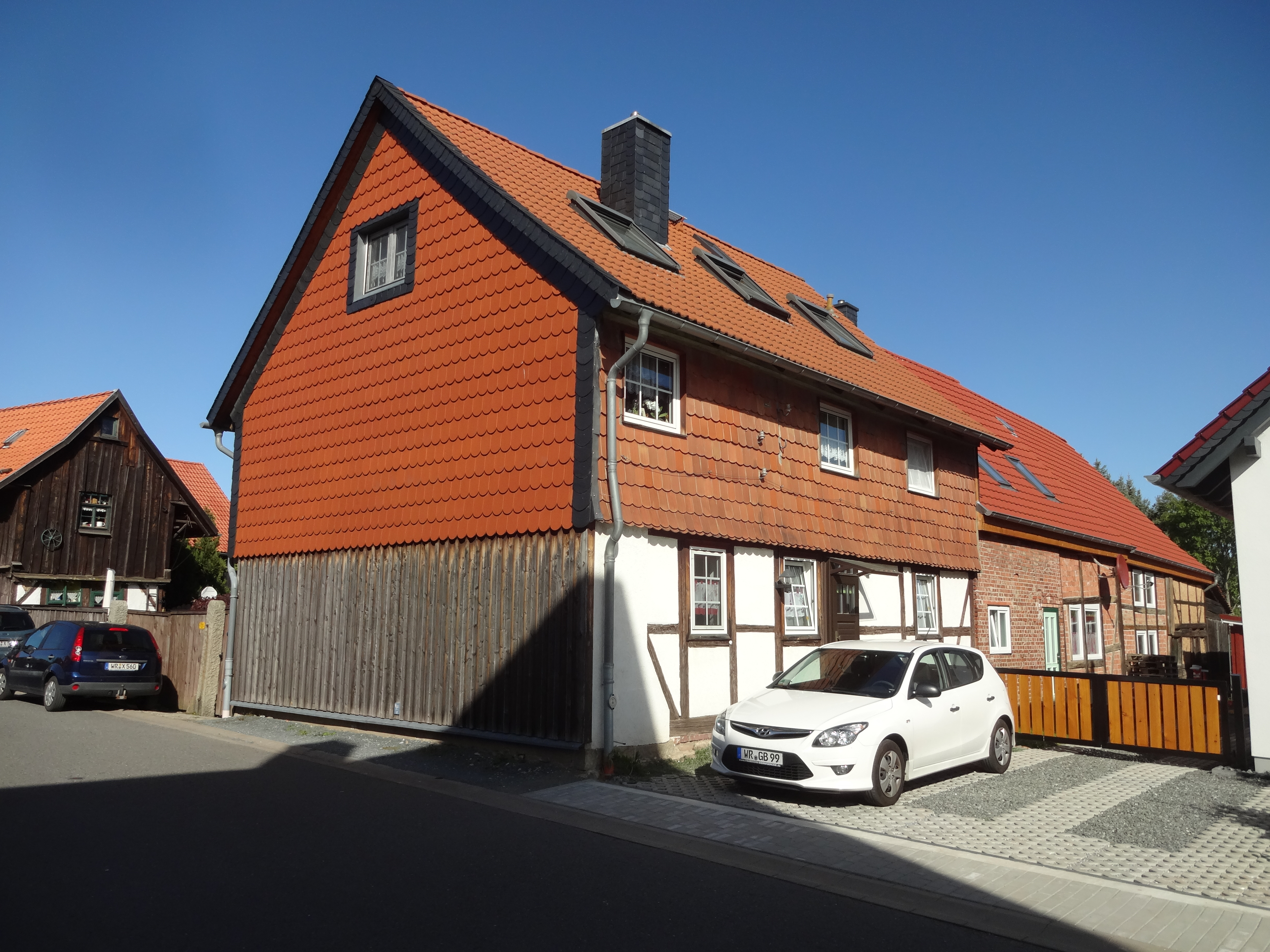 ehemals als Einzeldenkmal geschütztes Wohnhaus im Steinweg 9 in Drübeck